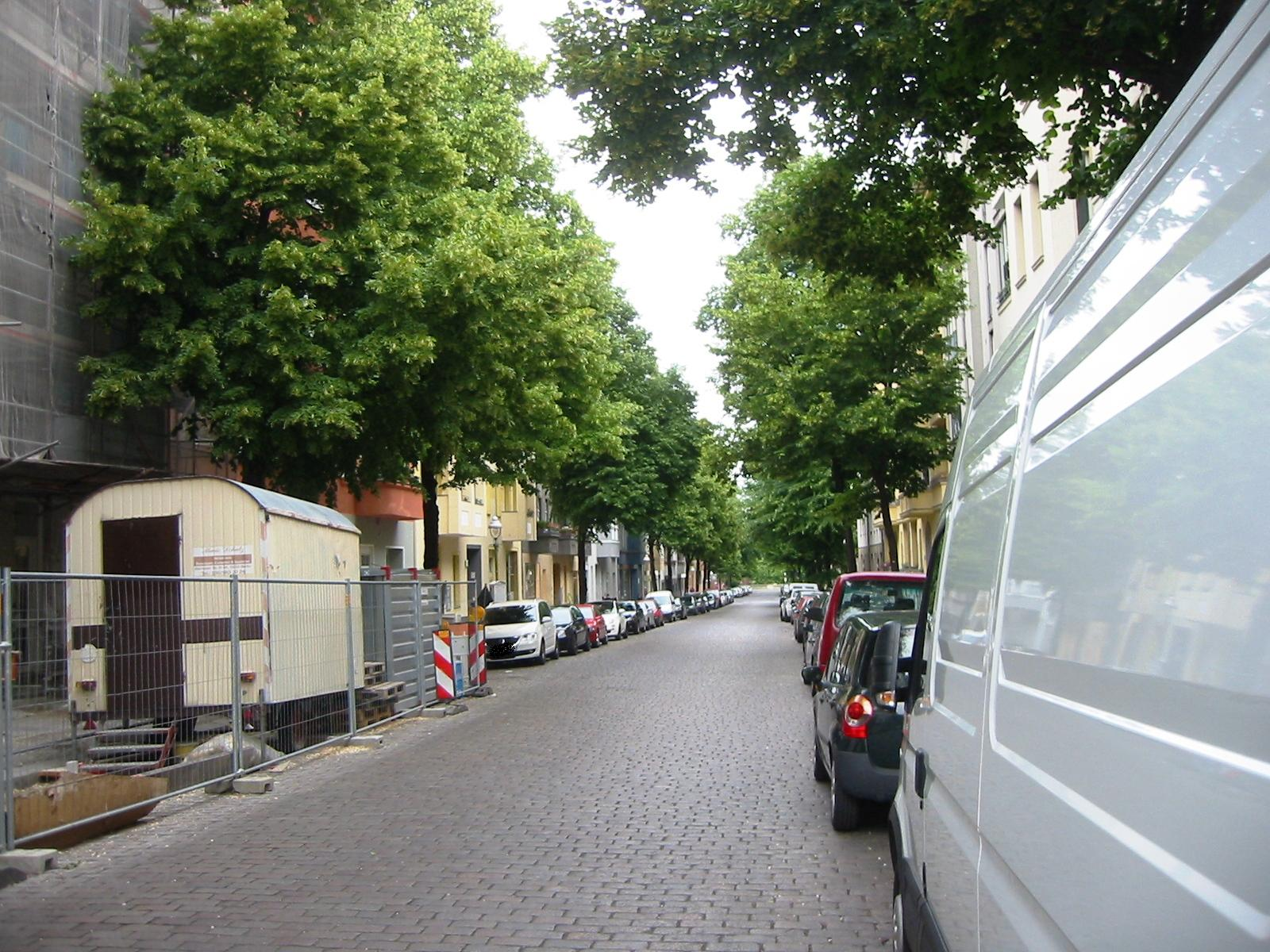 Berlin-Neukölln Jonasstraße